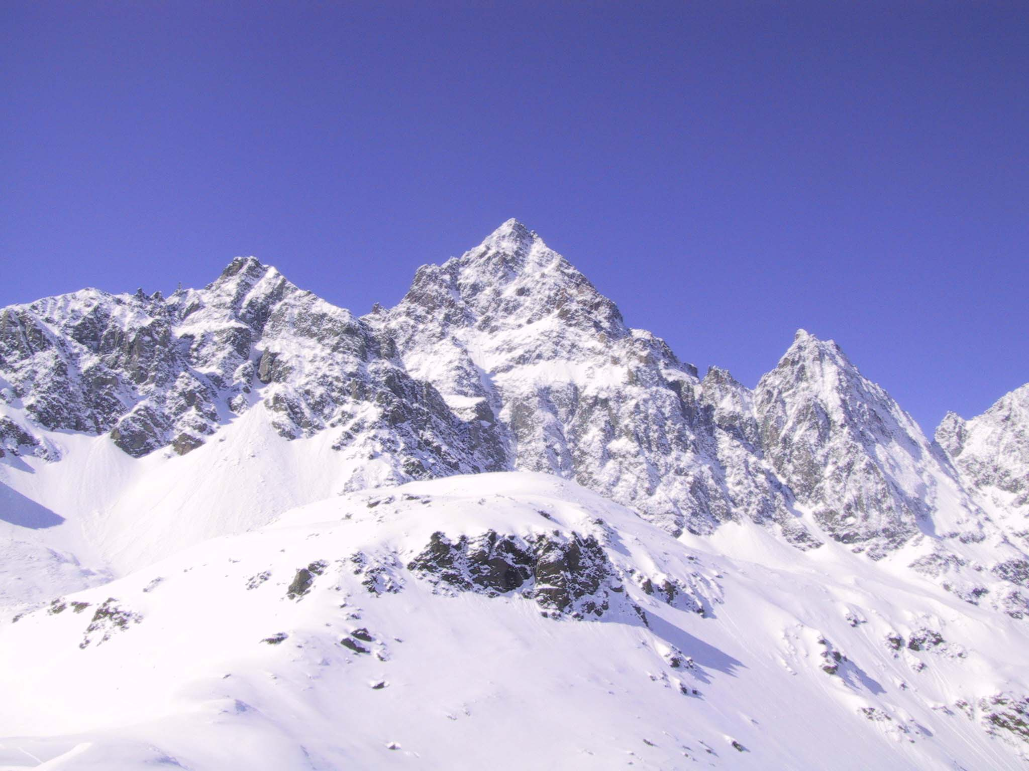 Monte Viso von Italien aus fotografiert